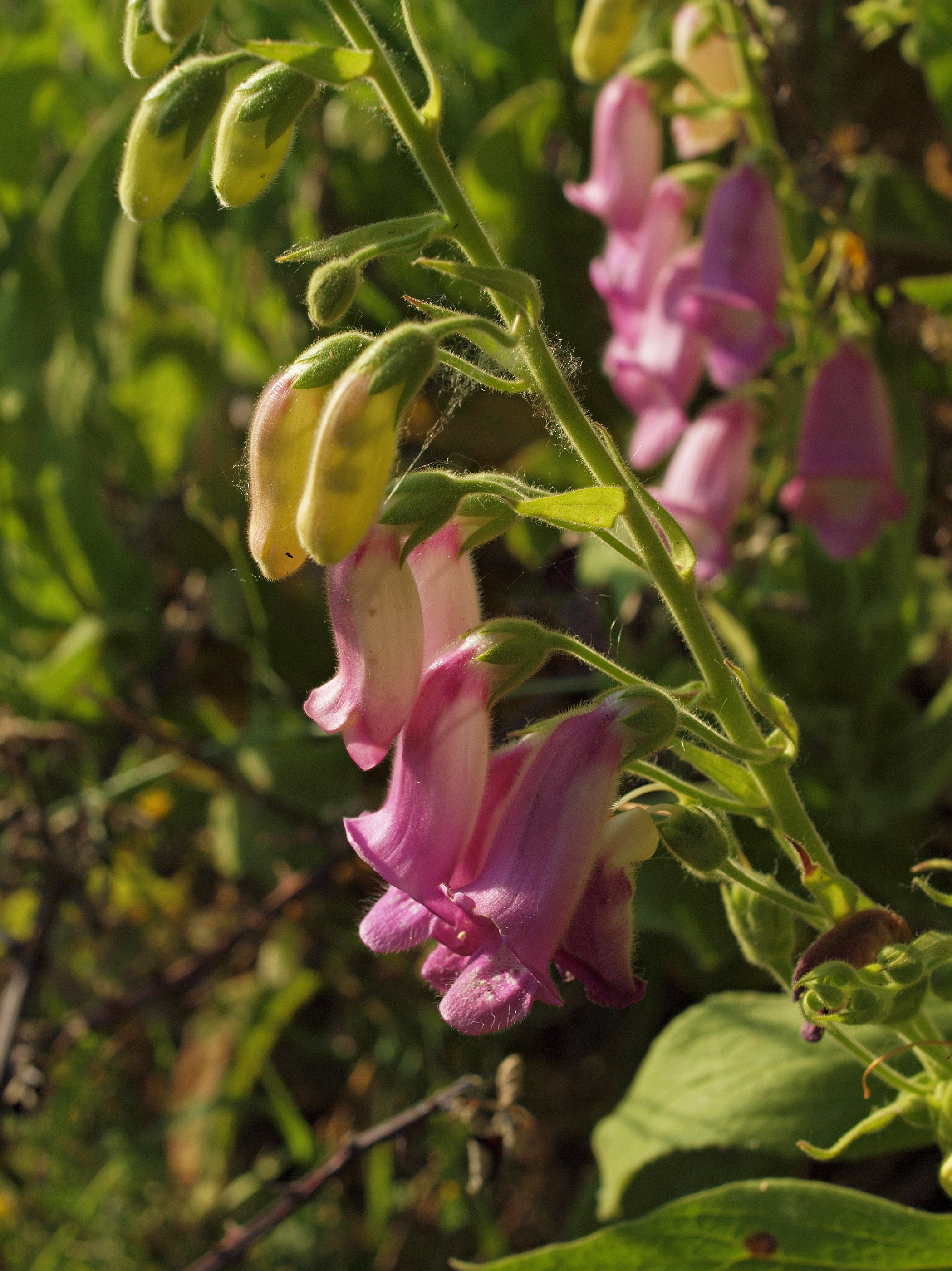 Digitalis thapsi. Losar de la Vera (Cáceres, España)